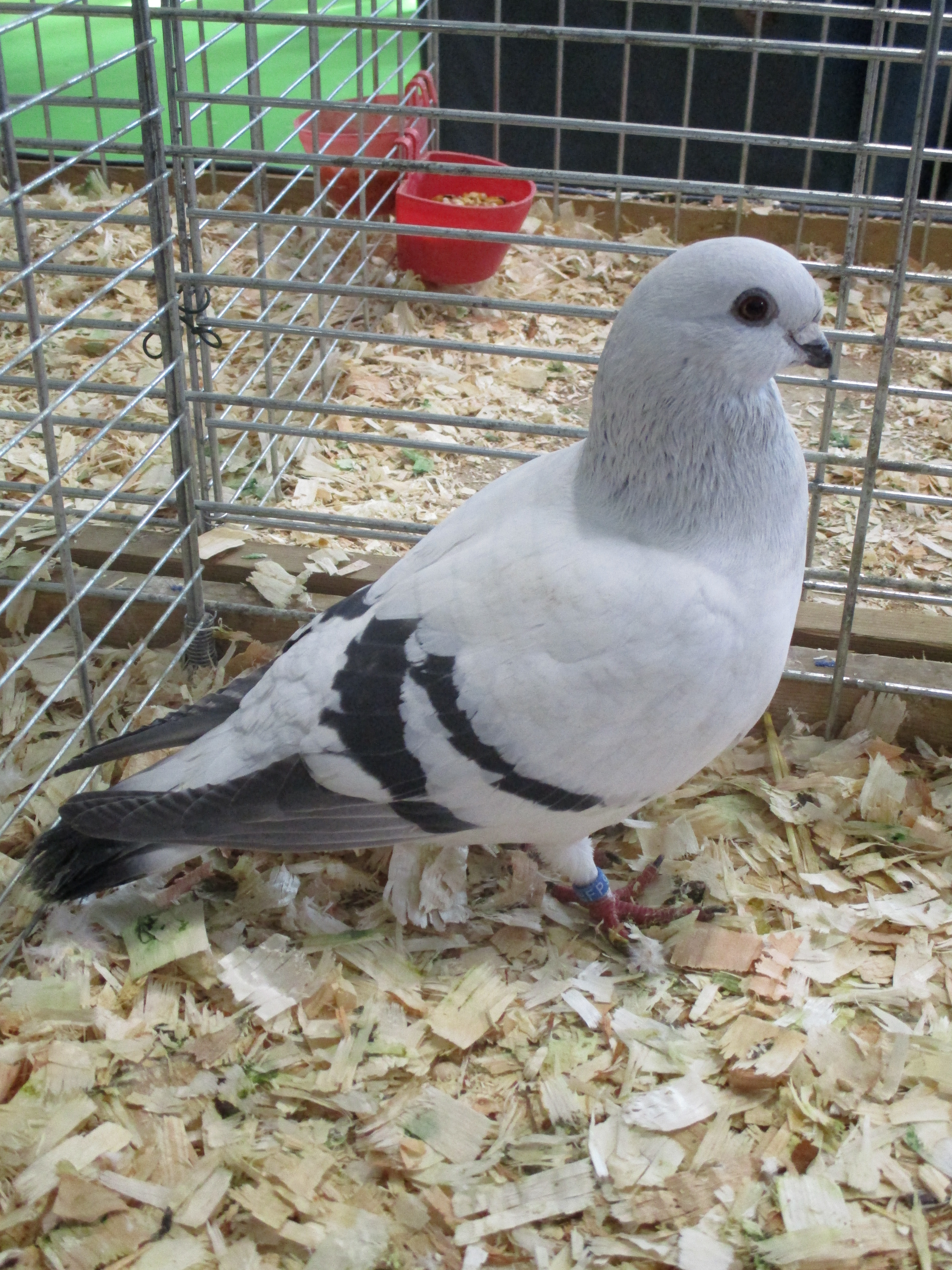 Pigeon damascène au plumage barré, couleur givrée. Salon de l'agriculture 2019.